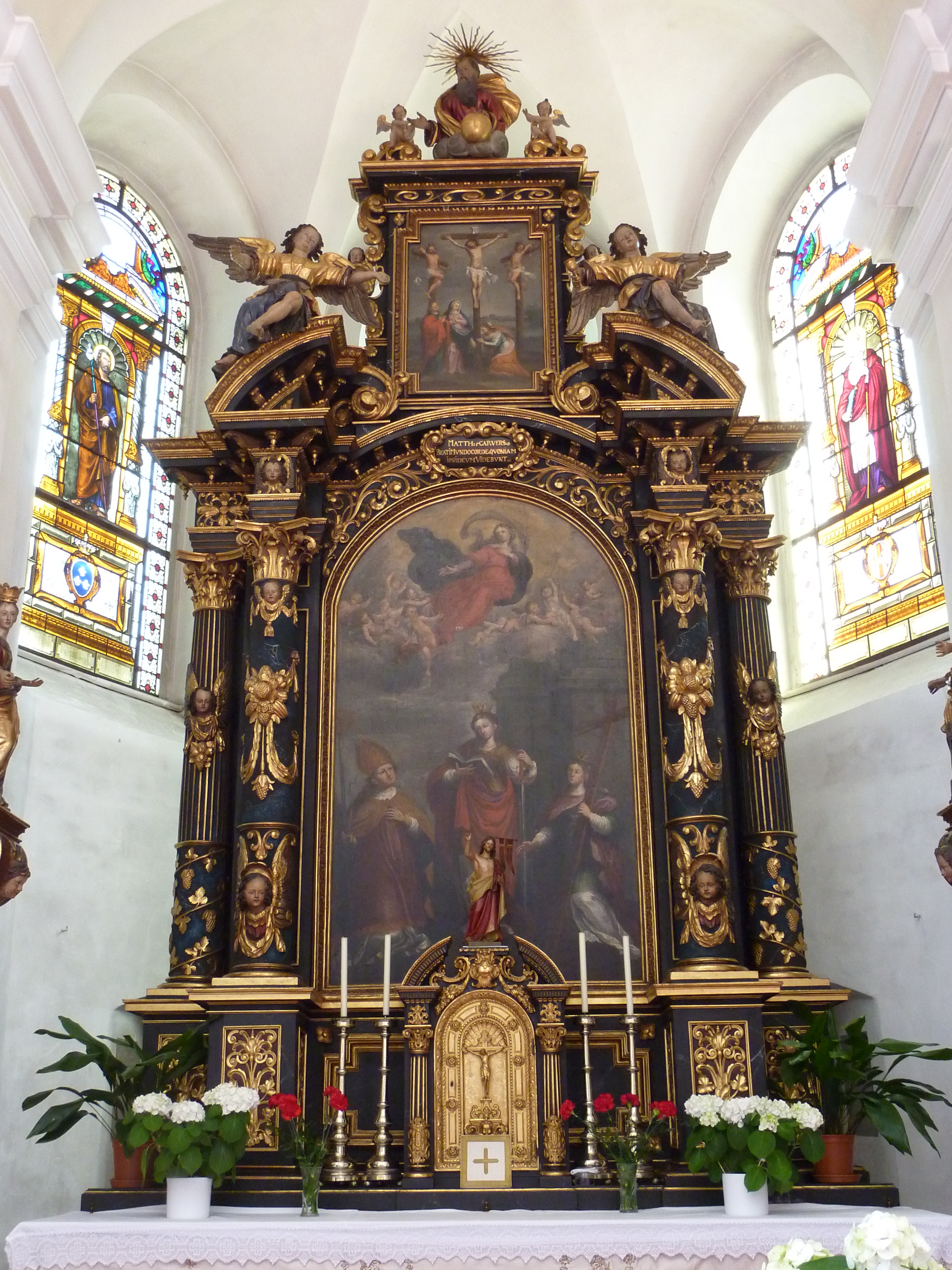 Pfarrkirche, Burg-, Schlosskapelle hl. Jakobus, Artstetten, Niederösterreich - Hochaltar mit Gemälde Mariä Himmelfahrt, darunter die hll. Leodegar, Barbara und Helena